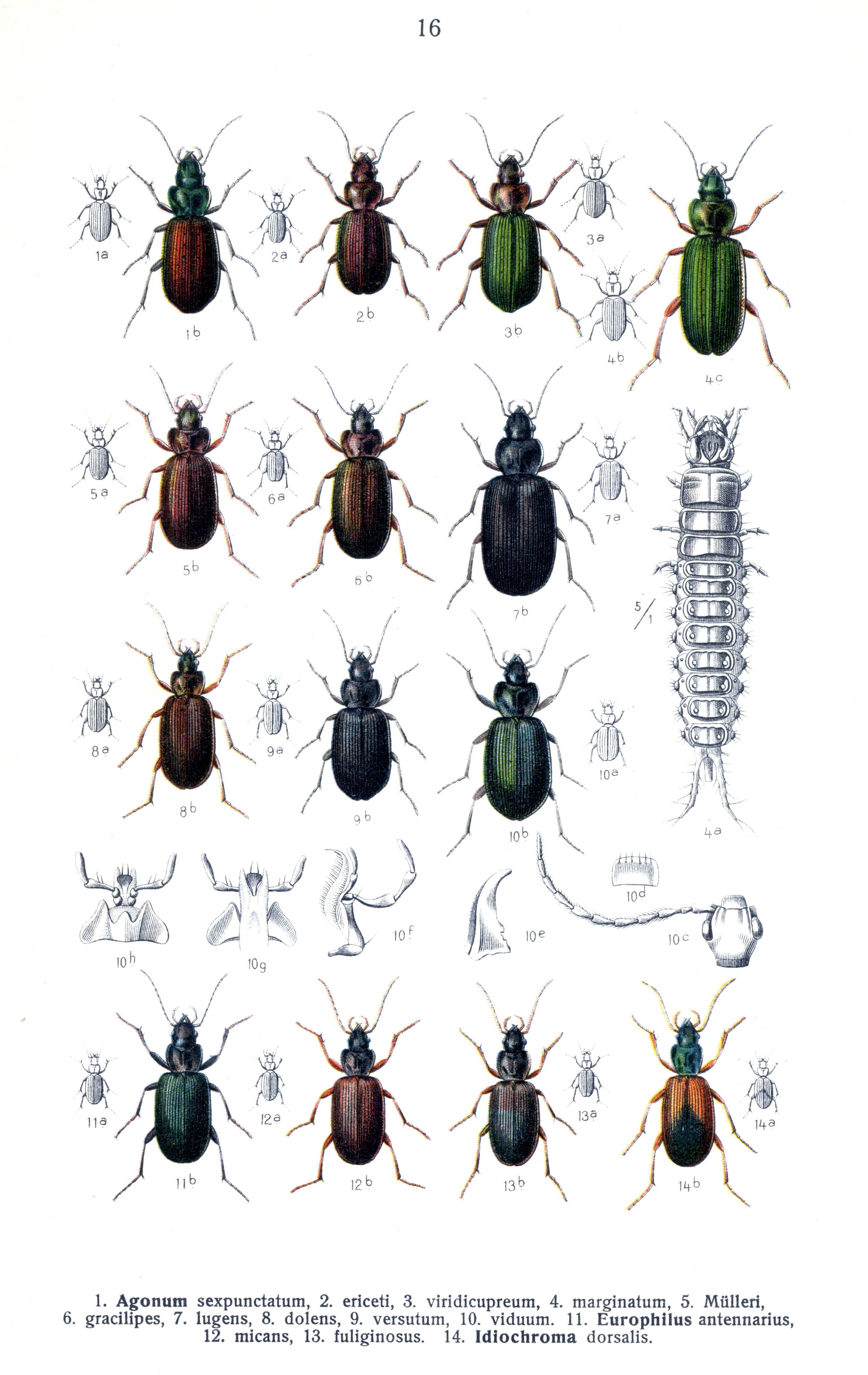 See image for index to numbers. Agonum sexpunctatum L. = Agonum sexpunctatum (Linnaeus 1758) (1a: size comparison, 1b: adult, dorsal view) [Agonum] ericeti Panz. = Agonum ericeti (Panzer, 1809) (2a: size comparison, 2b: adult, dorsal view) [Agonum] viridicupreum Goeze. = Agonum viridicupreum (Goeze, 1777) (3a: size comparison, 3b: adult, dorsal view) [Agonum] marginatum Lin. = Agonum marginatum (Linnaeus, 1758) (4a: larva, dorsal view, 4b: size comparison, 4c: adult, dorsal view) [Agonum] Mülleri Hrbst. = Agonum muelleri (Herbst, 1784) (5a: size comparison, 5b: adult, dorsal view) [Agonum] gracilipes Dftsch. = Agonum gracilipes (Duftschmid, 1812) (6a: size comparison, 6b: adult, dorsal view) [Agonum] lugens Dftsch. = Agonum lugens (Duftschmid, 1812) (7a: size comparison, 7b: adult, dorsal view) [Agonum] dolens Sahlb. = Agonum dolens (C.R.Sahlberg, 1827) (8a: size comparison, 8b: adult, dorsal view) [Agonum] versutum Gyll. = Agonum versutum Sturm, 1824 (9a: size comparison, 9b: adult, dorsal view) [Agonum] viduum Panz. = Agonum viduum (Panzer, 1796) (10a: size comparison, 10b: adult, dorsal view, 10c: head, dorsal view, 10d: labrum, 10e: mandible, 10f: maxilla, 10g: labium, dorsal view, 10h: labium, ventral view) Europhilus antennarius Dftsch. = Agonum antennarium (Duftschmid, 1812) (11a: size comparison, 11b: adult, dorsal view) [Europhilus] micans Dej. = Agonum micans (Nicolai, 1822) (12a: size comparison, 12b: adult, dorsal view) [Europhilus] fuliginosus Panz. = Agonum fuliginosum (Panzer, 1809) (13a: size comparison, 13b: adult, dorsal view) Idiochroma dorsalis Pontopp. = Anchomenus dorsalis (Pontoppidan, 1763) (14a: size comparison, 14b: adult, dorsal view)